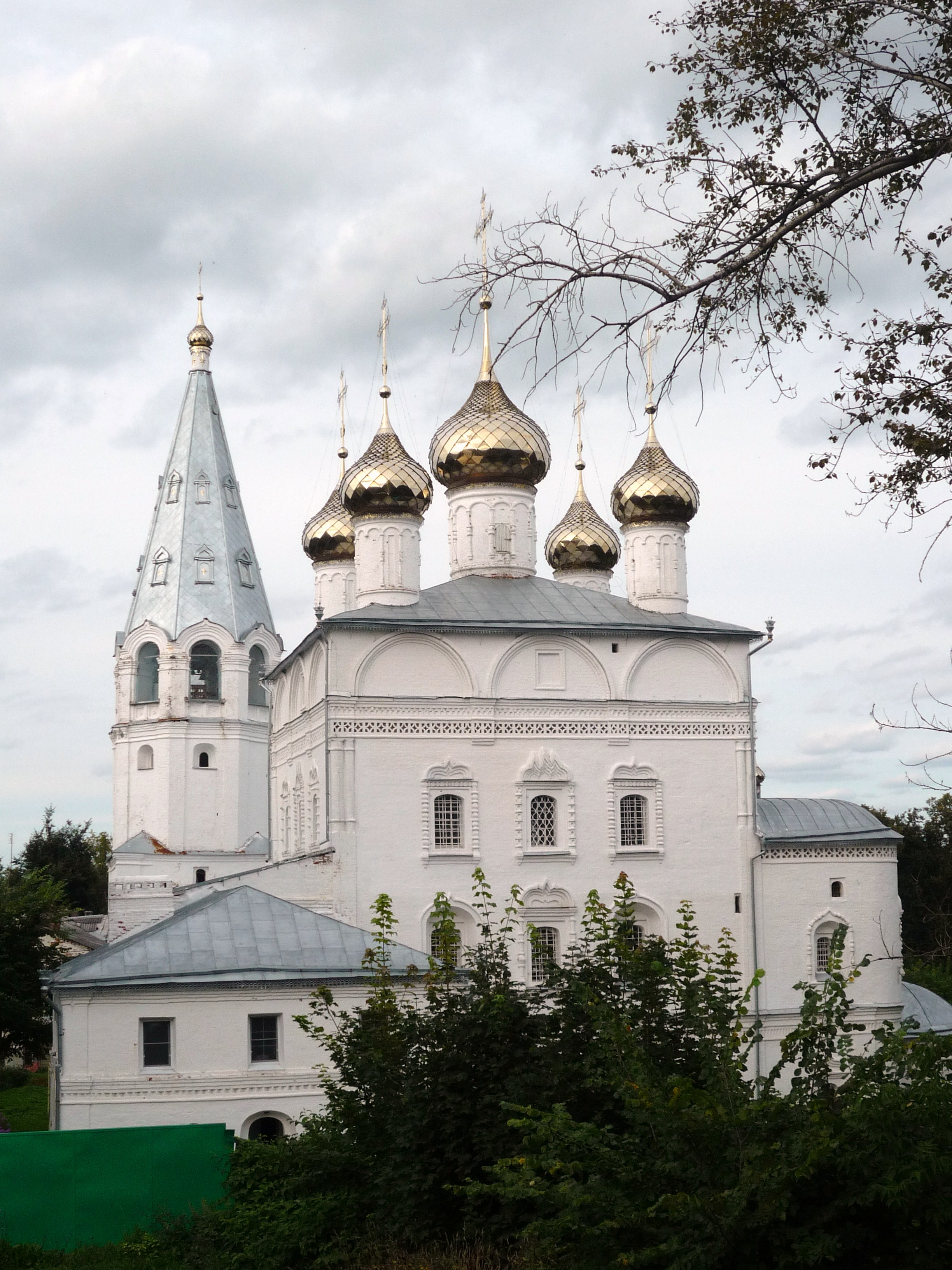 Благовещенский монастырь.Вязники